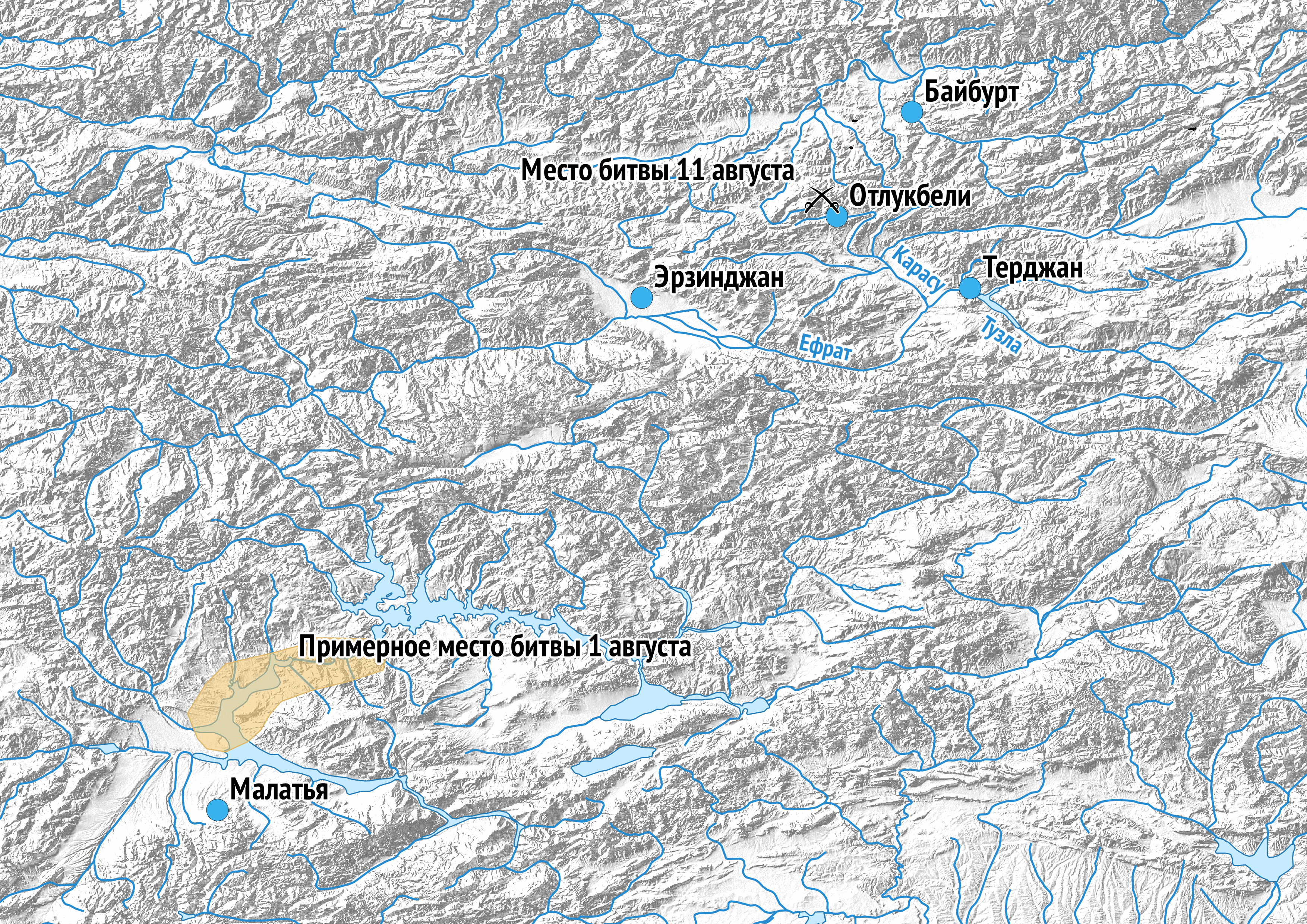 Битва при Отлукбели